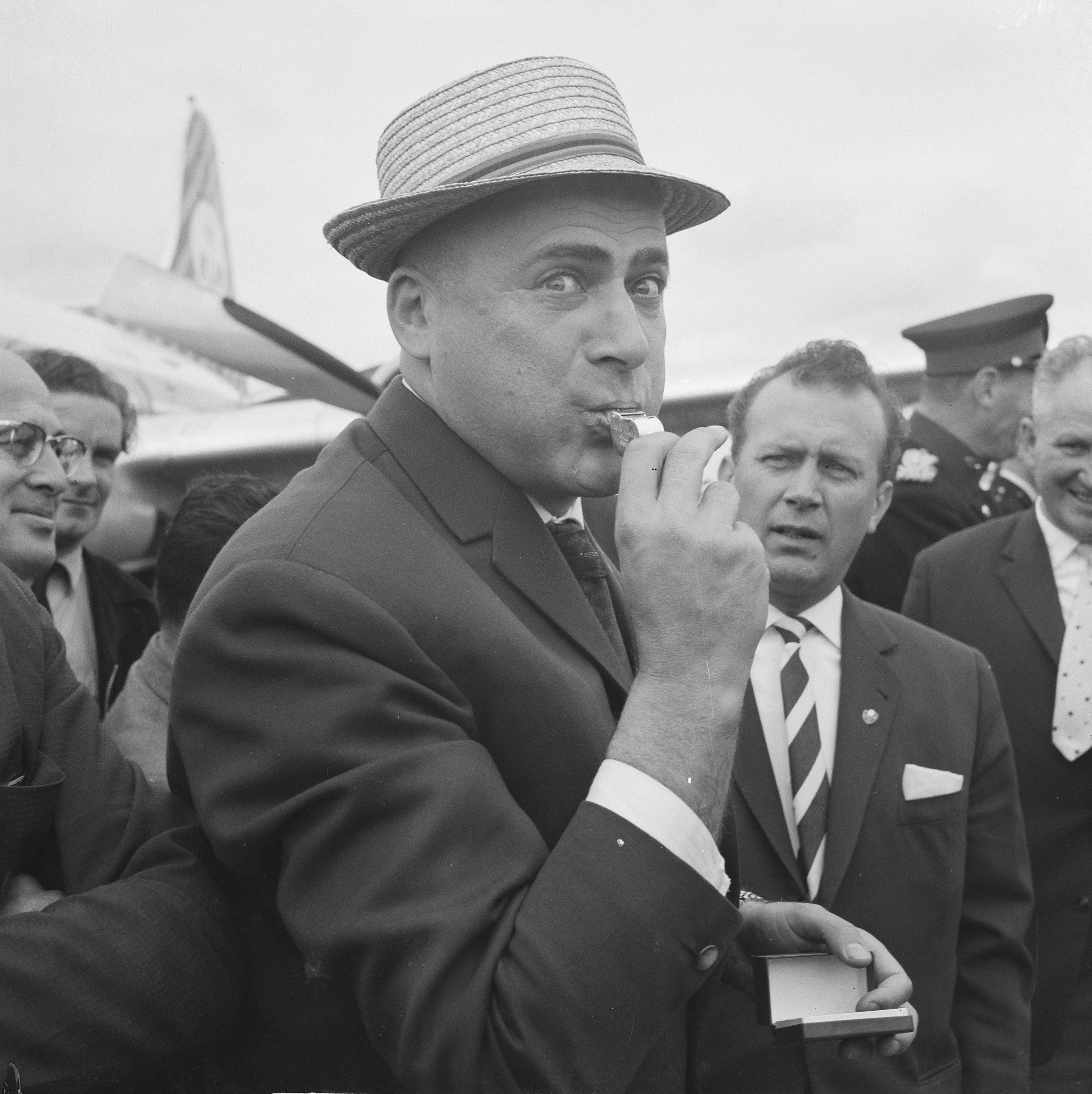 Collectie / Archief : Fotocollectie Anefo Reportage / Serie : [ onbekend ] Beschrijving : Leo Horn met zilveren fluit terug uit Chili (hij ws scheidsrechter bij wereldkampioenschappen voetbal aldaar) Datum : 20 juni 1962 Locatie : Noord-Holland, Schiphol Trefwoorden : fluiten, scheidsrechters, sport, vliegvelden, voetbal Persoonsnaam : Horn Leo Fotograaf : Nijs, Jac. de / Anefo Auteursrechthebbende : Nationaal Archief Materiaalsoort : Negatief (zwart/wit) Nummer archiefinventaris : bekijk toegang 2.24.01.03 Bestanddeelnummer : 914-0442